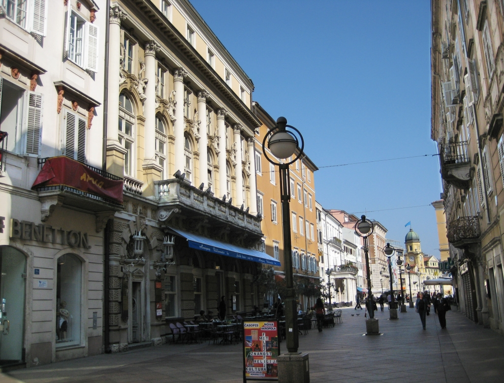 Korzo i zgrada Filodrammatice s lijeve strane. Rijeka